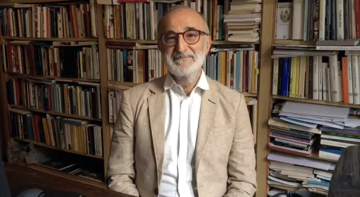 Il Prof. Giovanni Tesio nel suo studio a Torino.